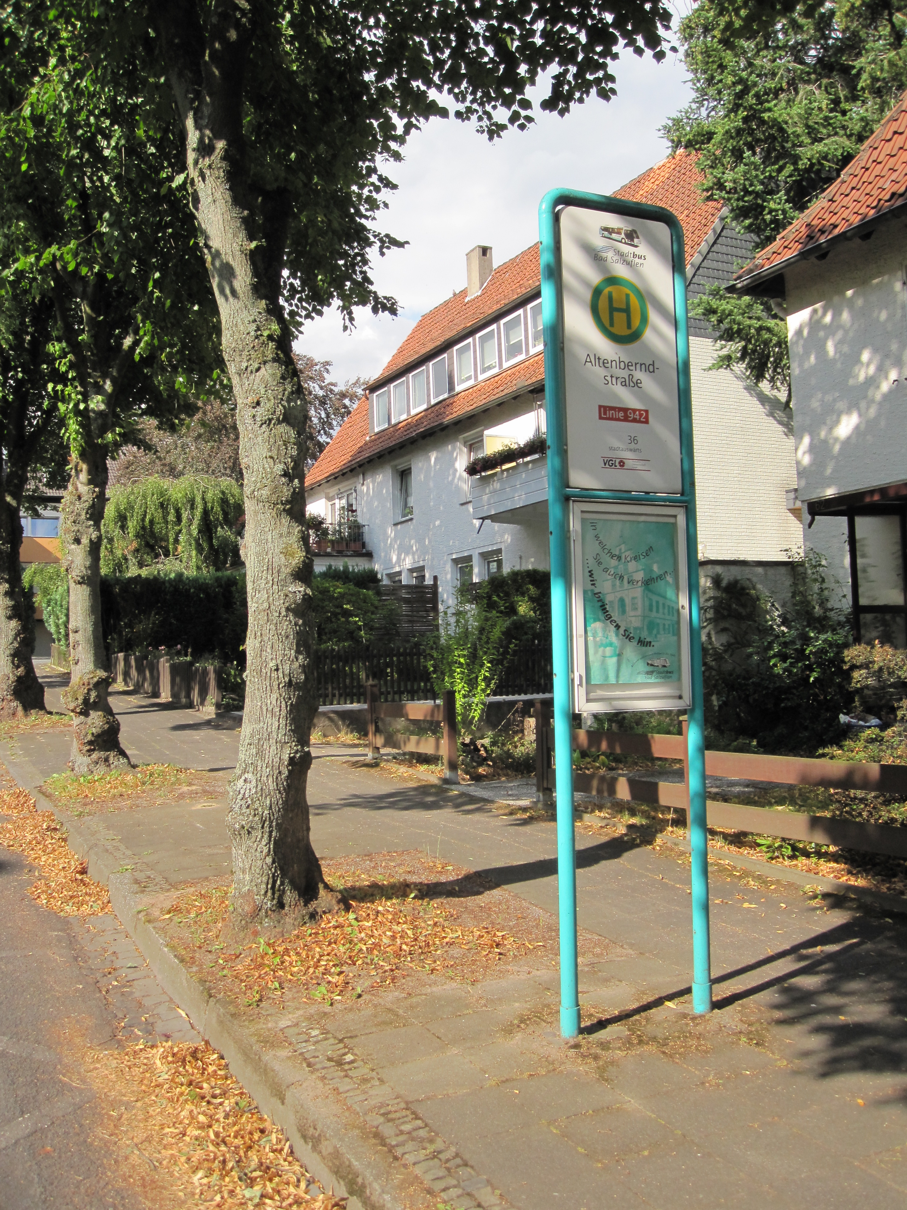 Haltestelle Altenberndstraße Stadtbus Bad Salzuflen